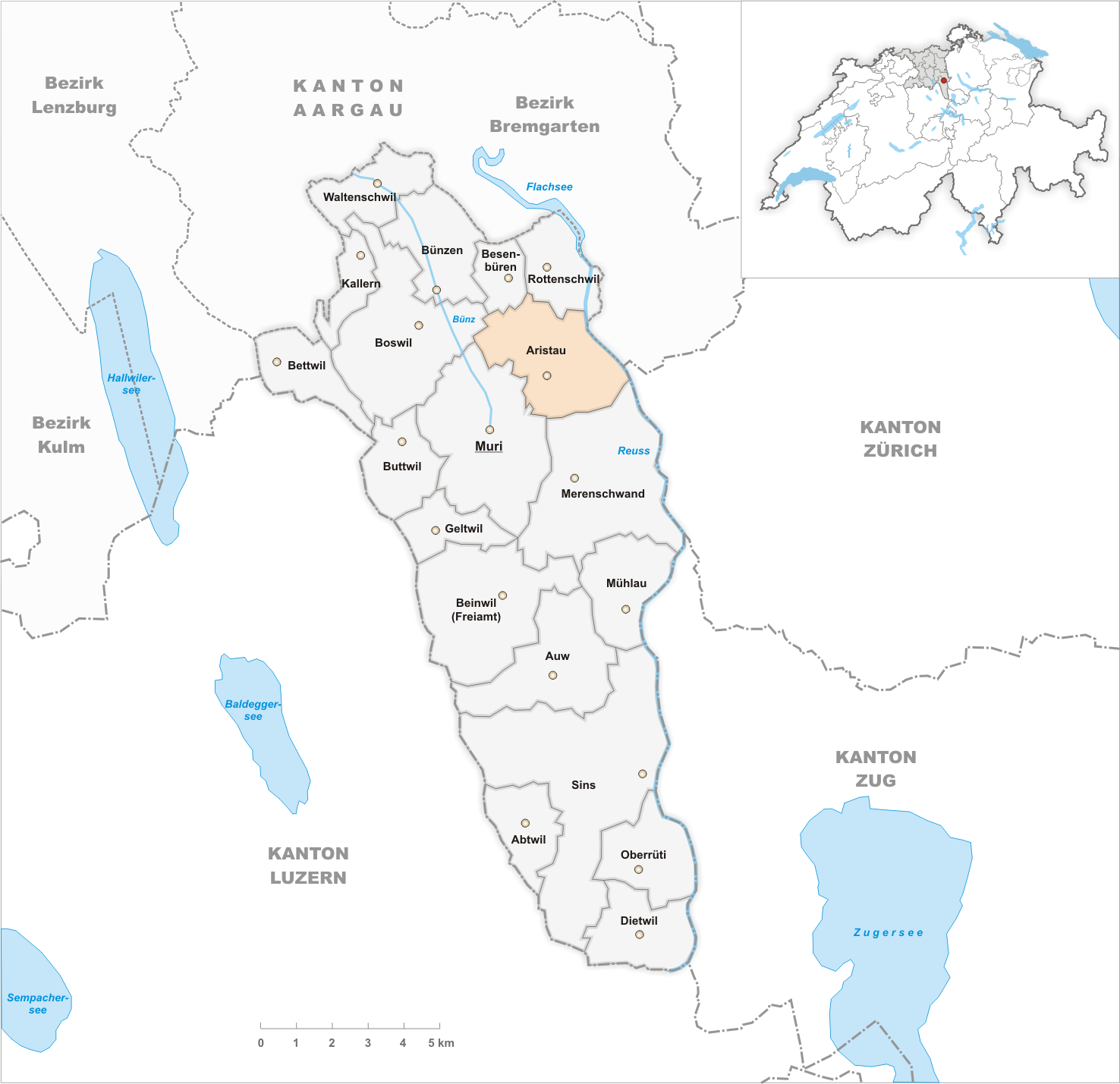 Municipality Aristau